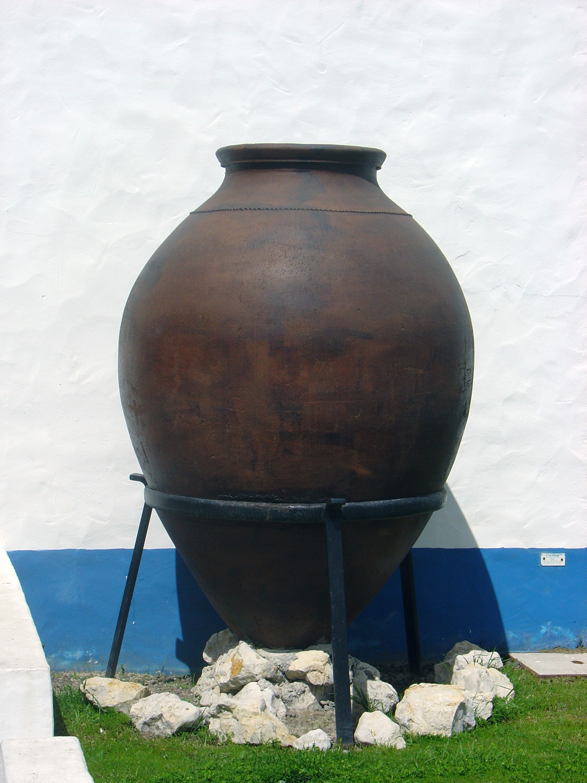 Descrição original: Uma talha utilizada como objecto decorativo no exterior Estação de Serviço de Vendas Novas - A6 Alentejo - Portugal.